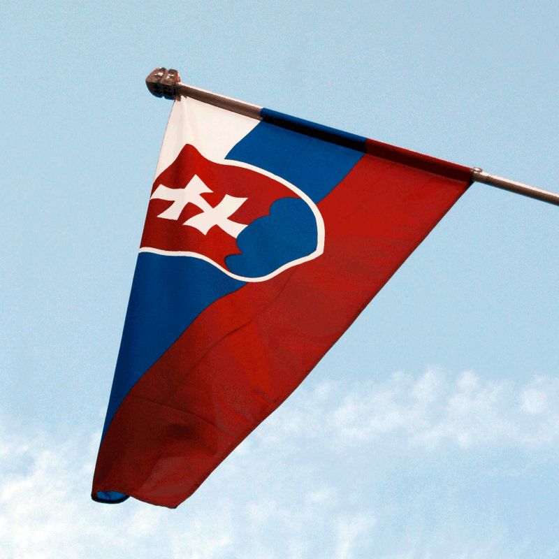 Flag of Slovakia